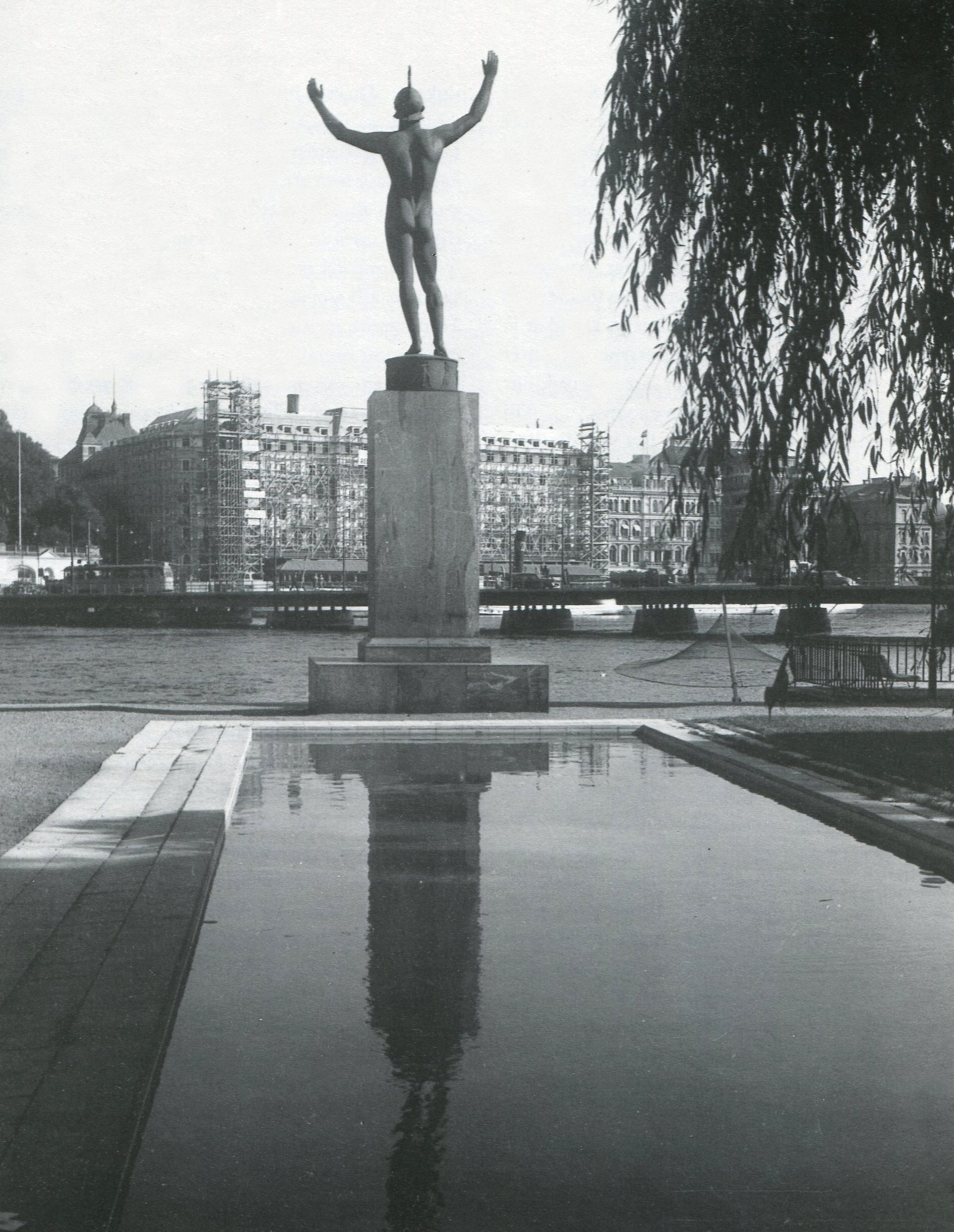 Strömparterren med utsikt mot Strömbron. I förgrunden fiskehåvar och Milles staty "Solsångaren". I fonden syns Grand Hotel med byggnadsställningar